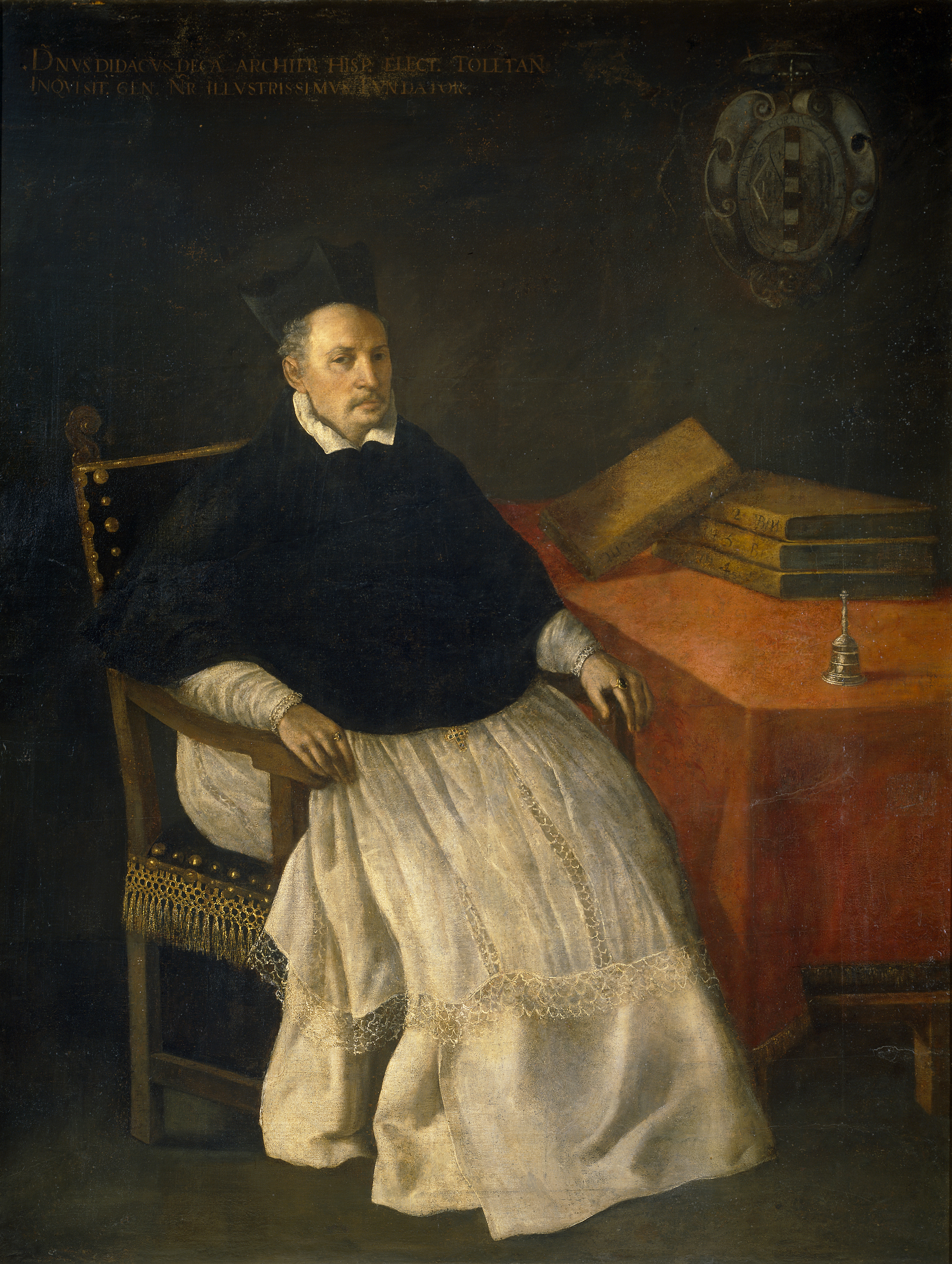 Retrato del eclesiástico español Diego de Deza (1443-1523), que llegó a ser obispo de Zamora, Salamanca, Jaén, Palencia, Inquisidor General del Santo Oficio y arzobispo de Sevilla.